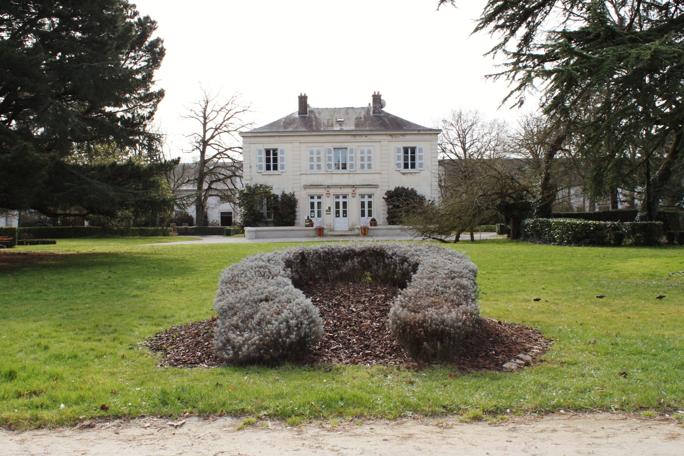 Façade Nord du Haras de la Vendée. Maison du directeur en arrière plan.